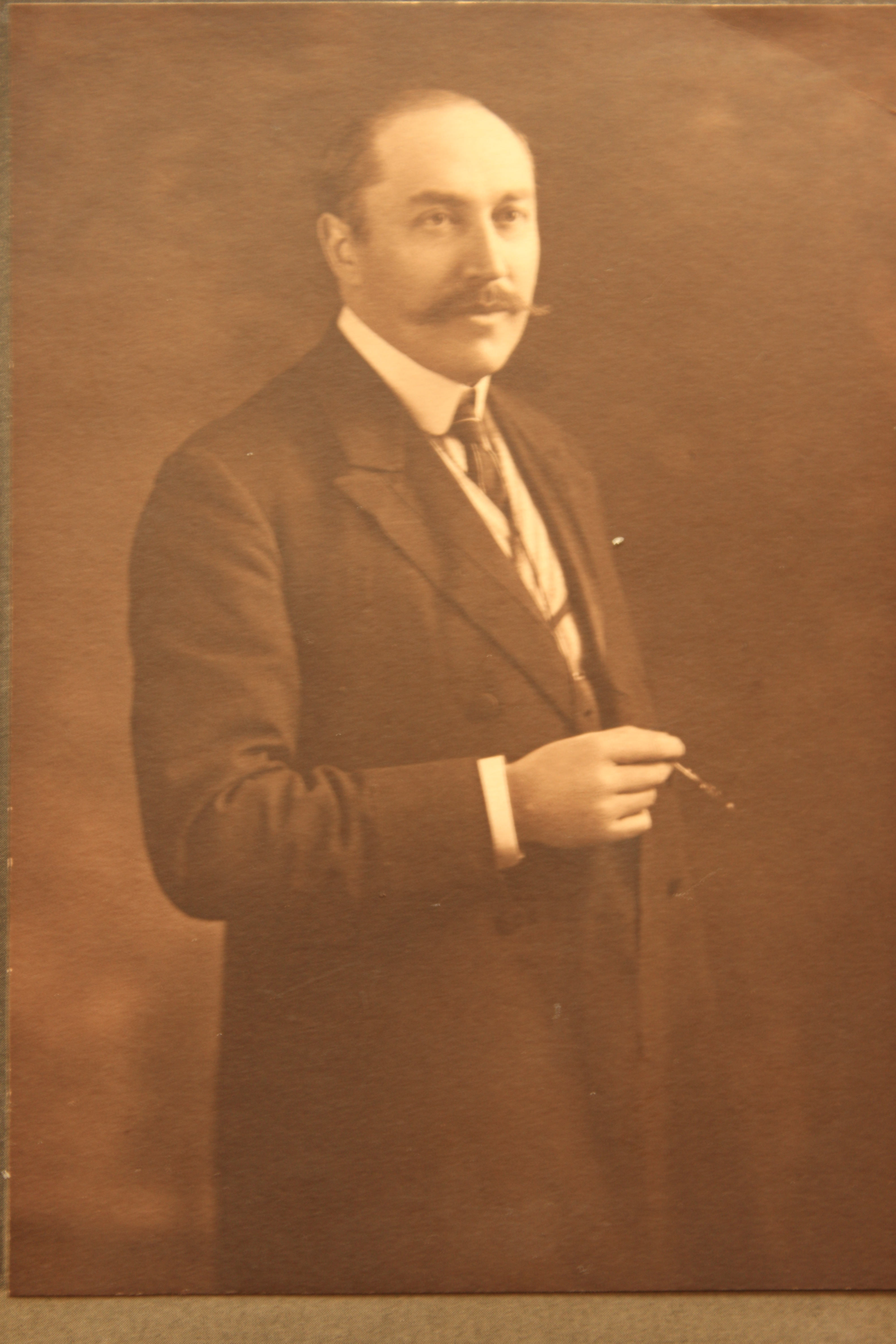 Der französische Ägyptologe Alexandre Moret (1868-1938)